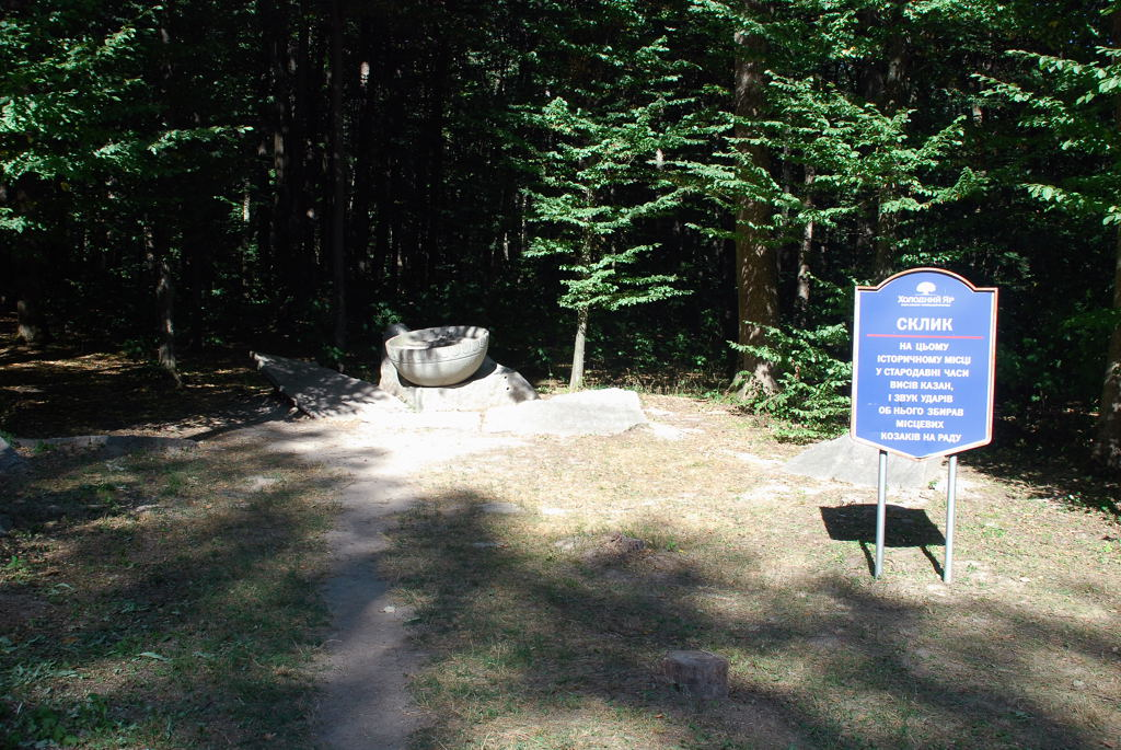 Козацький склик, Чигирин, Холодний яр